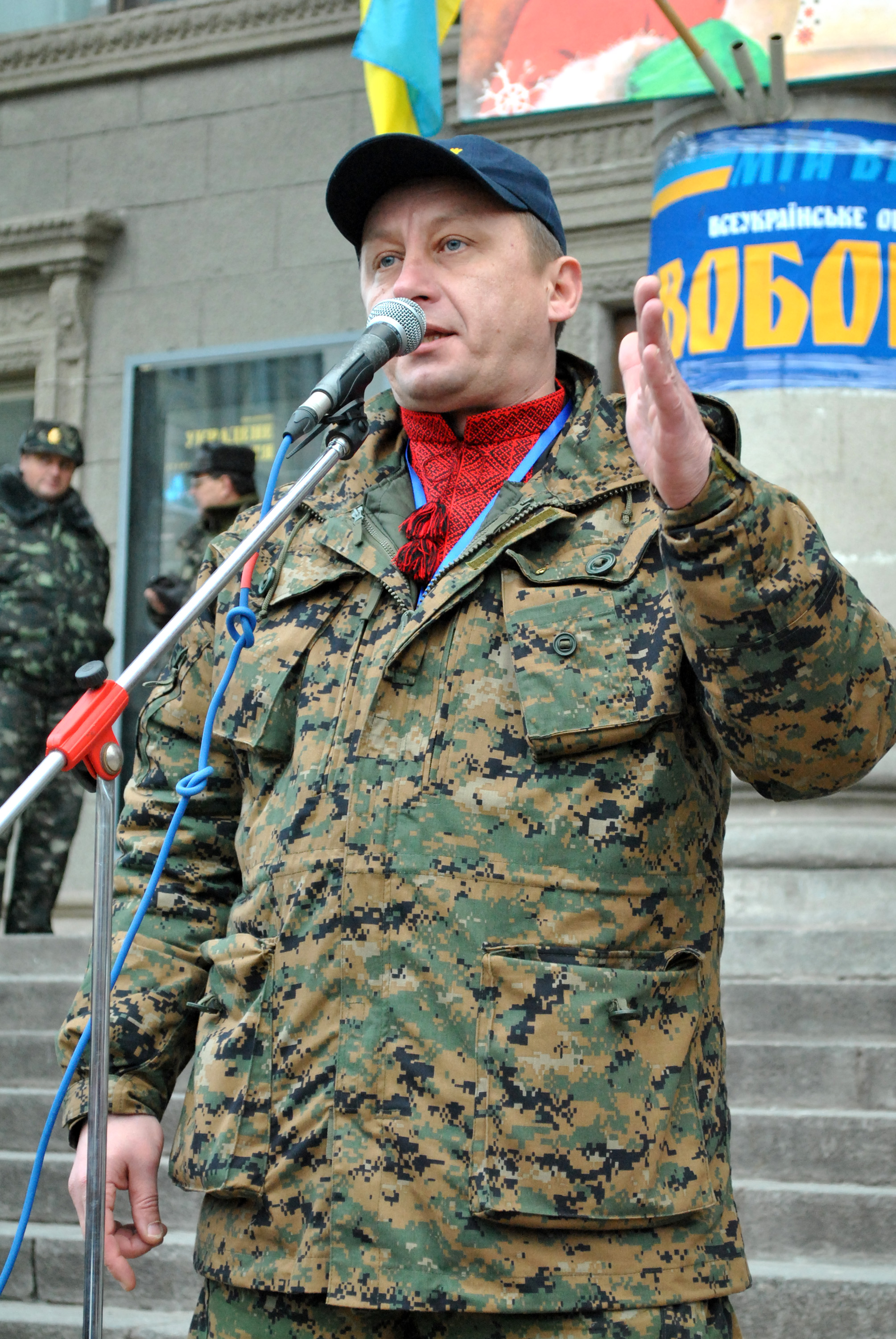 Координатор революційного руху в Тернополі — керівник Штабу національного спротиву Володимир Стаюра під час одного з мітингів на Театральному майдані в Тернополі.